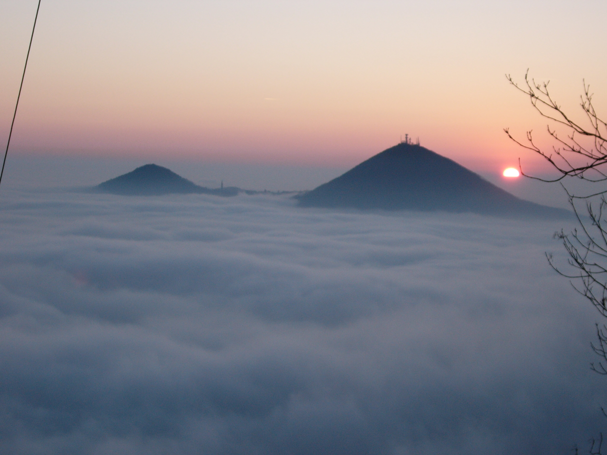 Monte Cero nella nebbia